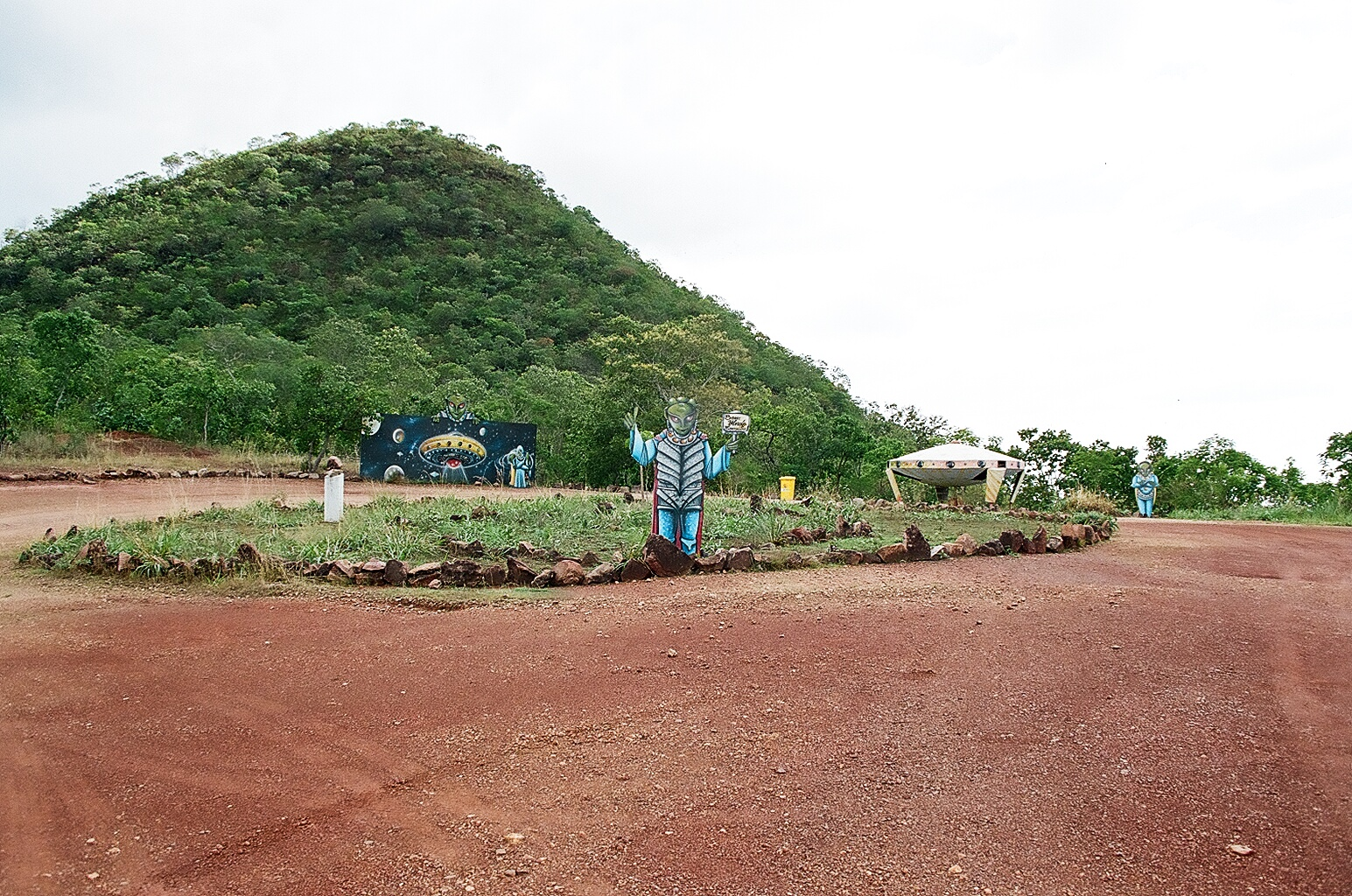 Discoporto - Barra do Garças - Mato Grosso - Brasil